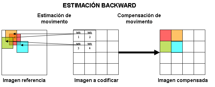 Esquema para il·lustrar concepto de un articulo